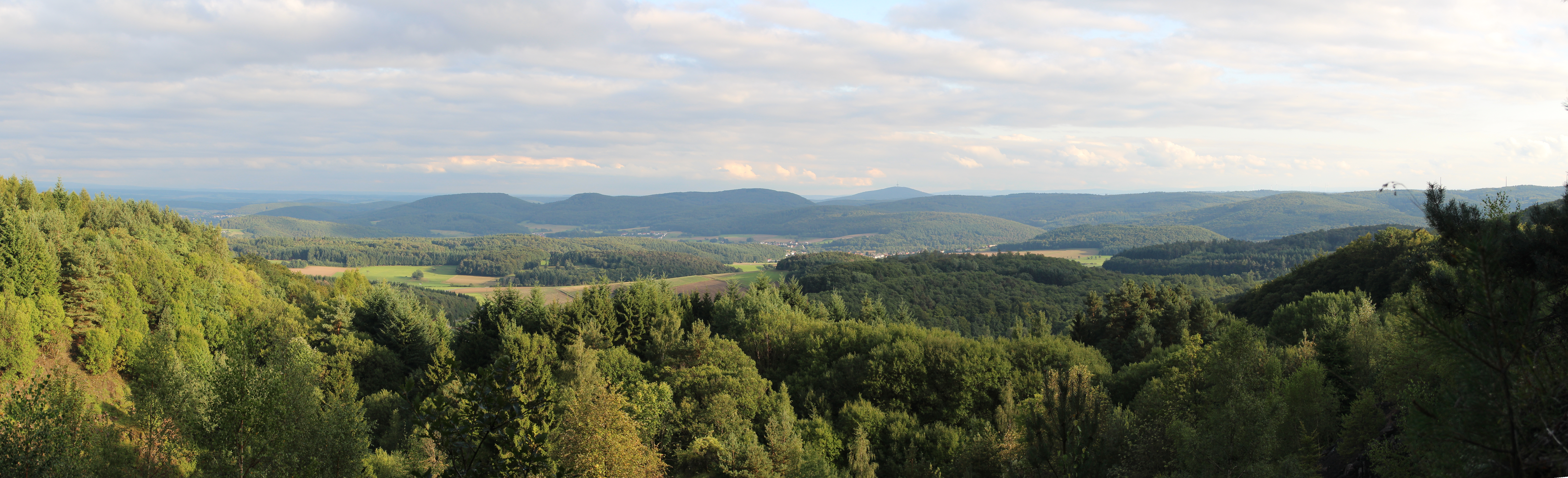 Steinbruch bei Rachelshausen